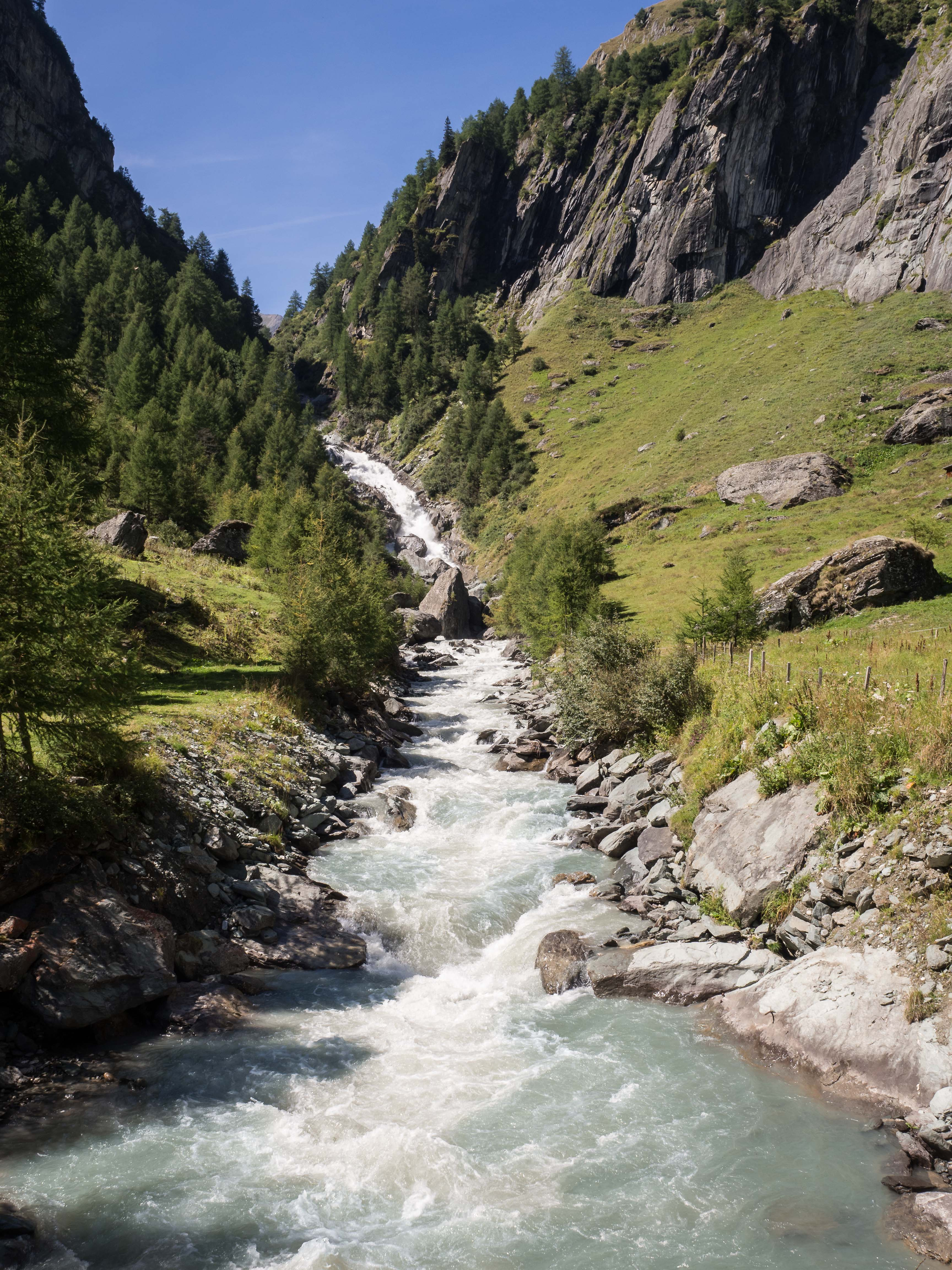 Wasserfälle im Umbaltal This media shows the natural monument in the Tyrol with the ID ND_7_37.